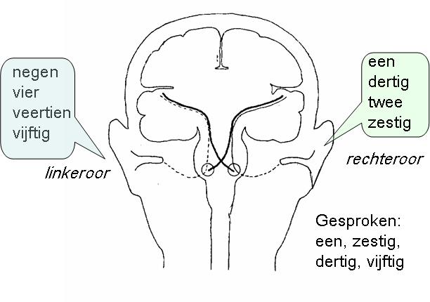 dichotisceh lusitertaak versie3